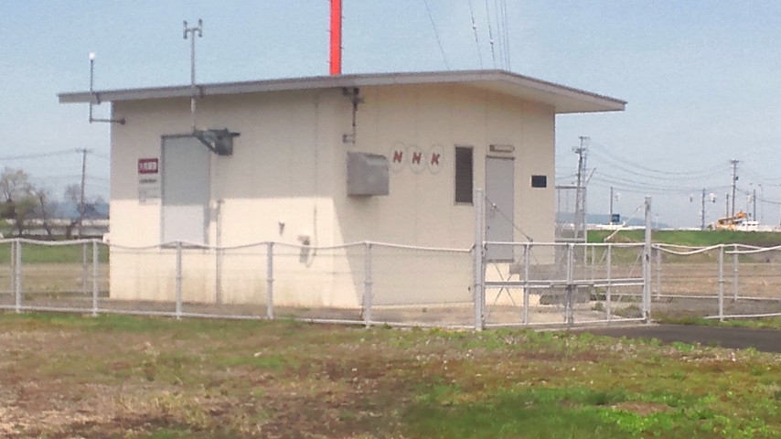 NHKラジオ湯沢放送局局舎